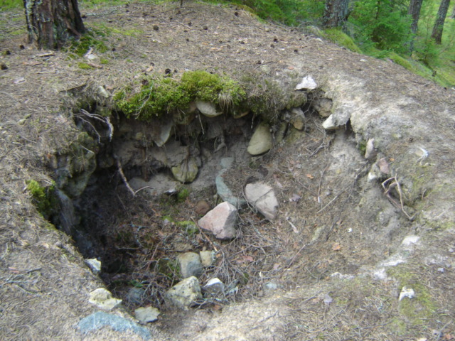 Kaeve Purtsa maalinna vallis